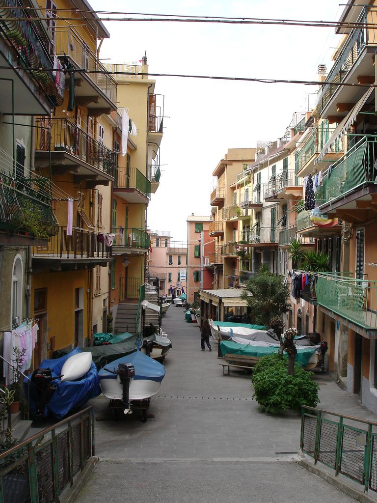 Manarola, Liguria, Italy.